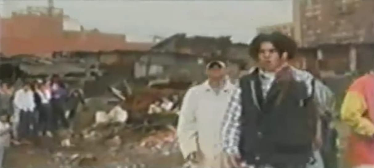 La Etnia, La Vida En El Guetto (1994)